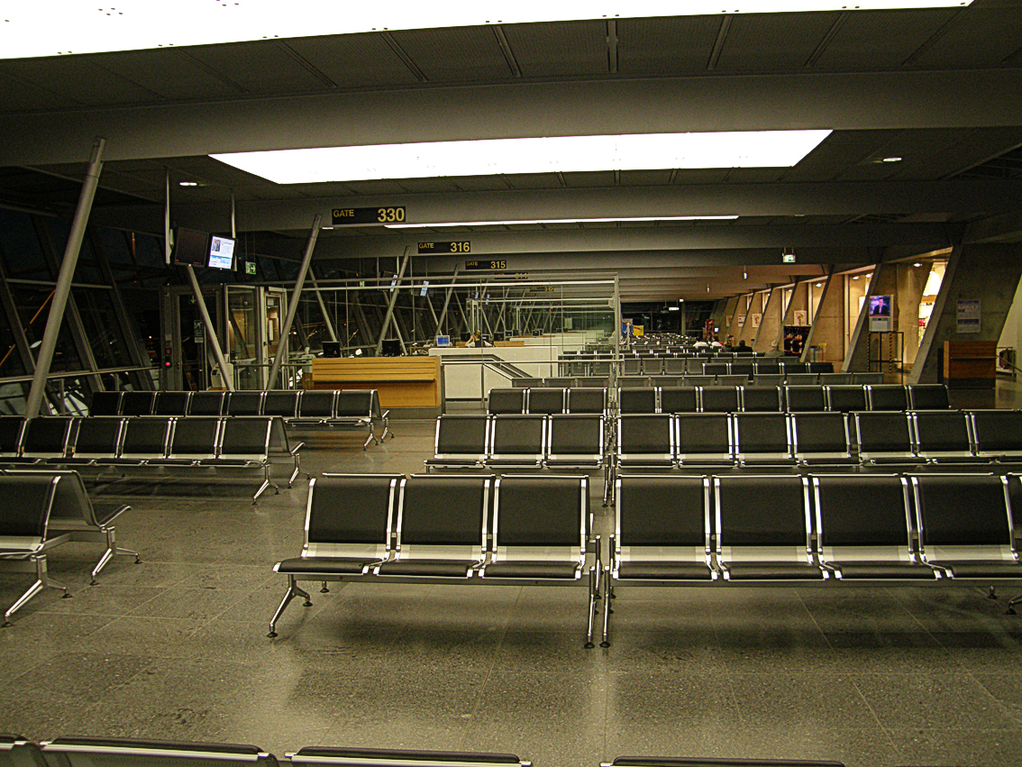 die leeren Sitze im Terminal 1